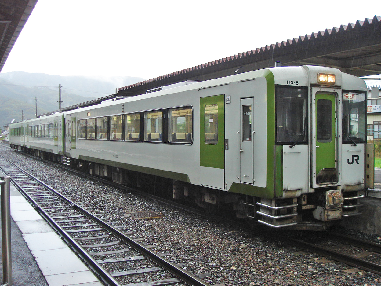 遠野駅に停車中のJR東日本キハ110系気動車（キハ110形0番台）快速「はまゆり」